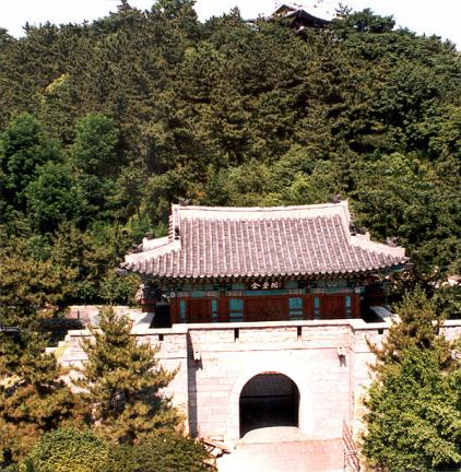 부산광역시 기념물 제7호 부산진성